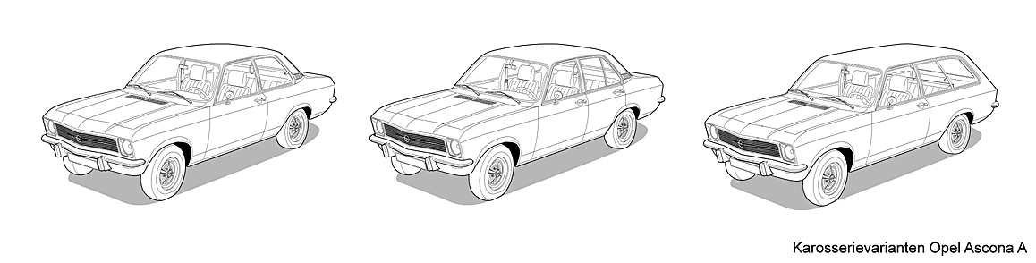 Karosserievarianten des Ascona A. Strichillustration. Illustrator Frank Welches